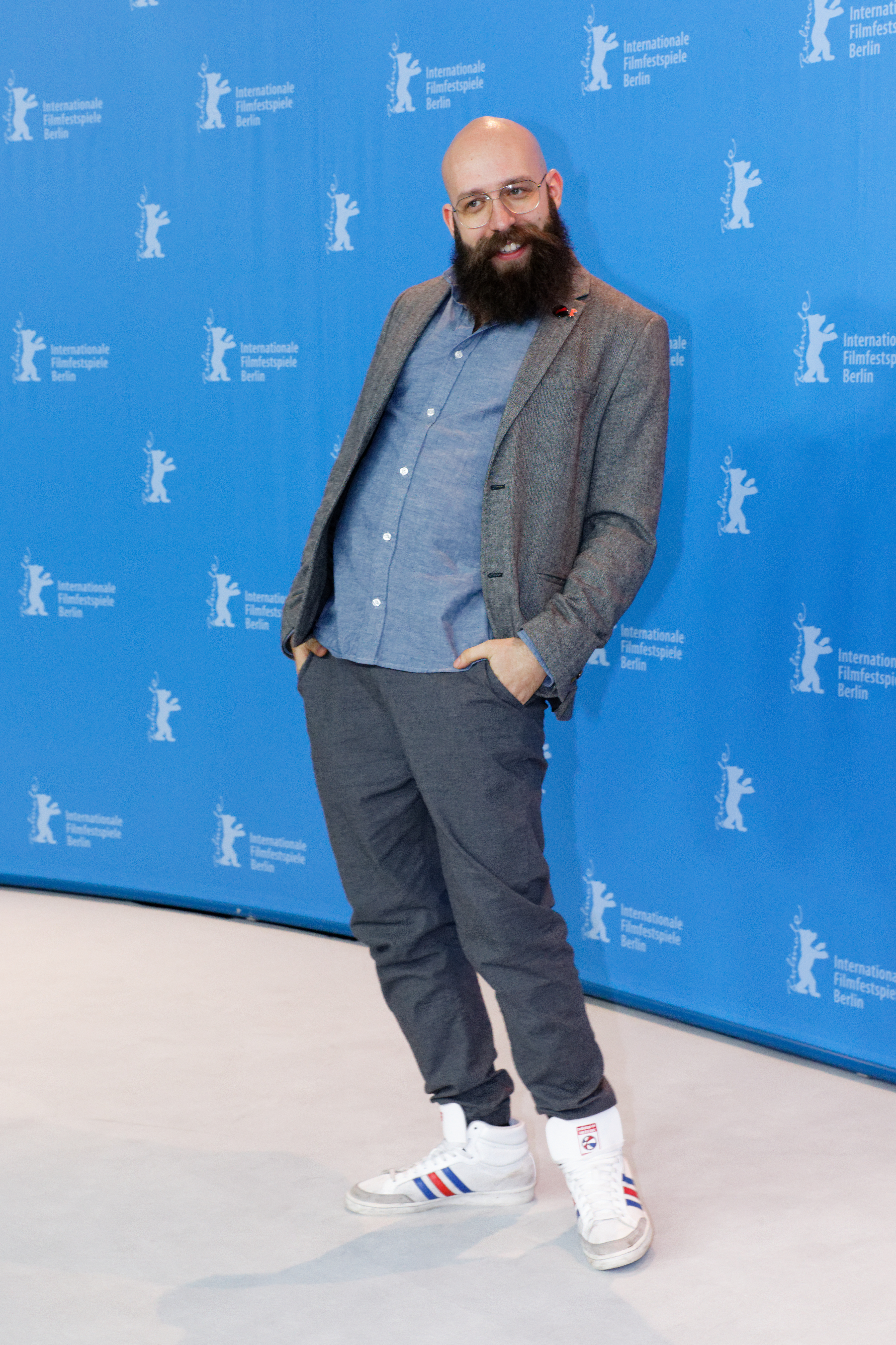 Jakob Lass beim Photo Call zu Tiger Girl bei der Berlinale 2017